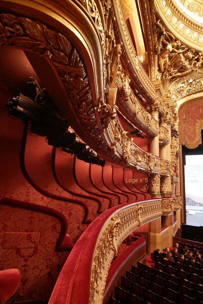 Premières loges de côté